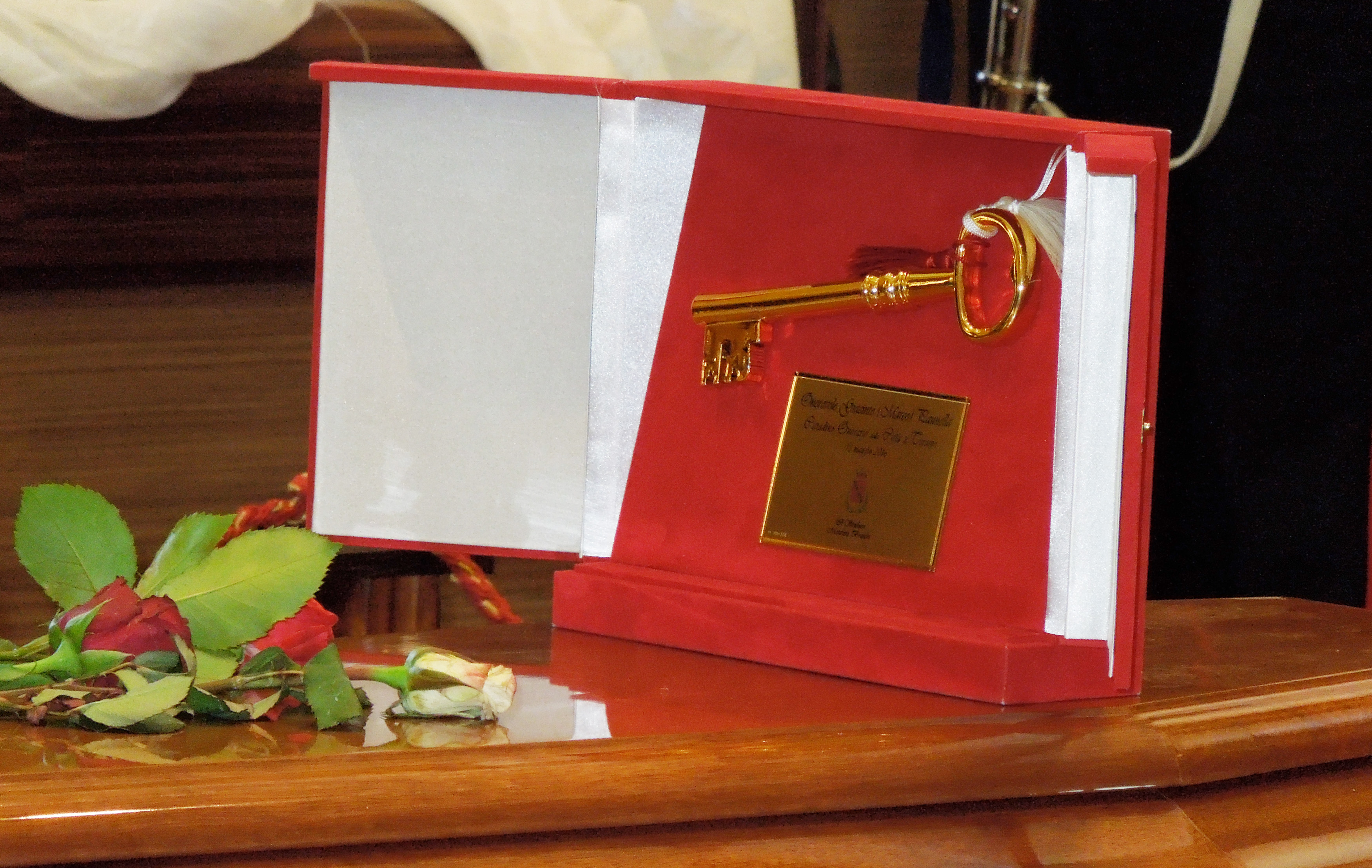 Chiavi della Città di Teramo conferite col titolo di Cittadinanza Onoraria a Marco Pannella il 12 maggio 2016 e consegante il 13 maggio 2016, presso la sua abitazione di Roma, dal sindaco Maurizio Brucchi.